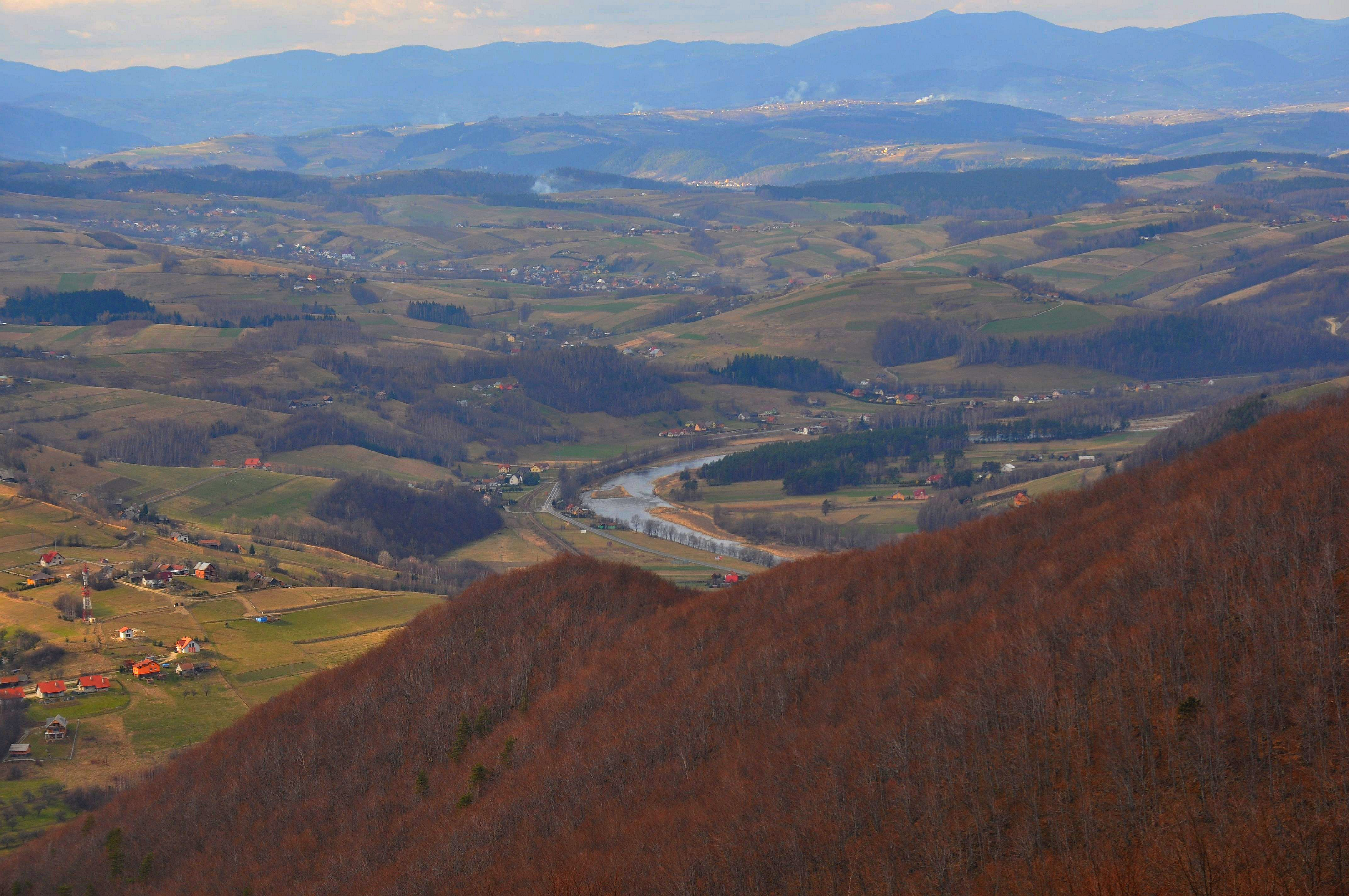 Specjalny obszar ochrony siedlisk Ostoja Popradzka. This is a photography of Natura 2000 protected area with ID PLH120019